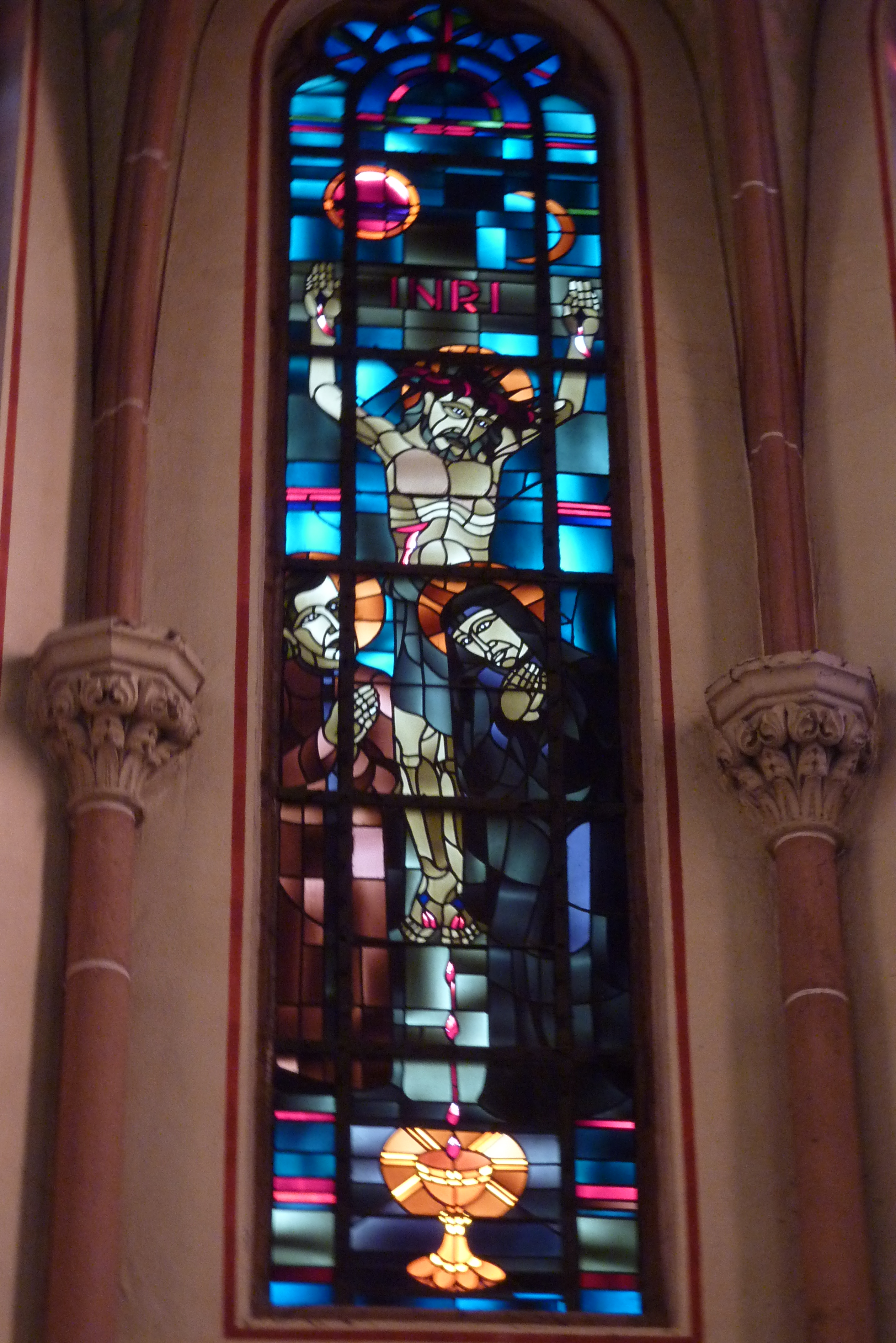 katholische Pfarrkirche St. Nikolaus in Bensberg, Bleiglasfenster des Chors, Entwurf: Fritz Schaefler (1933-1936), Darstellung: Kreuzigung (mit Maria und Johannes)